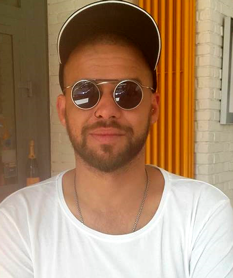 Polski choreograf i tancerz Michał Piróg w sierpniu 2016 roku.